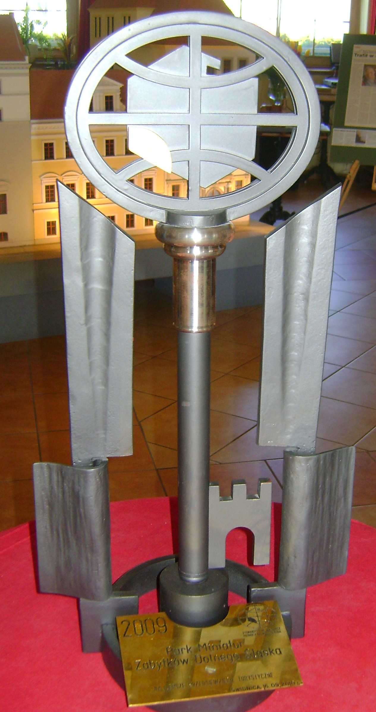 Statuetka Dolnośląskiego Klucza Sukcesu w Parku Miniatur Zabytków Dolnego Śląska w Kowarach.